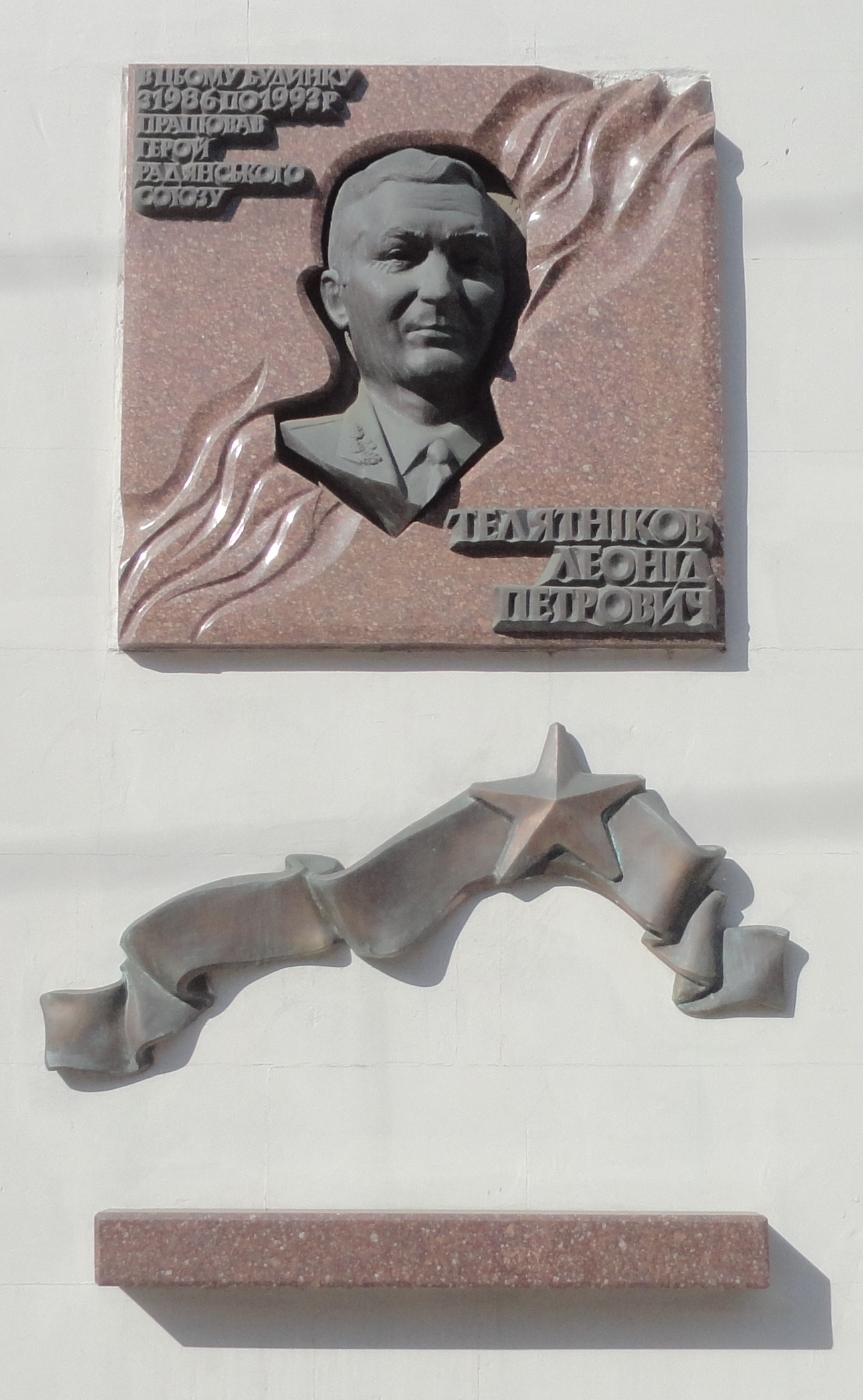 Телятников Леонид Петрович. Памятная доска, установлена в г. Киев на здании ГУ МЧС ул. Межигорская, 8